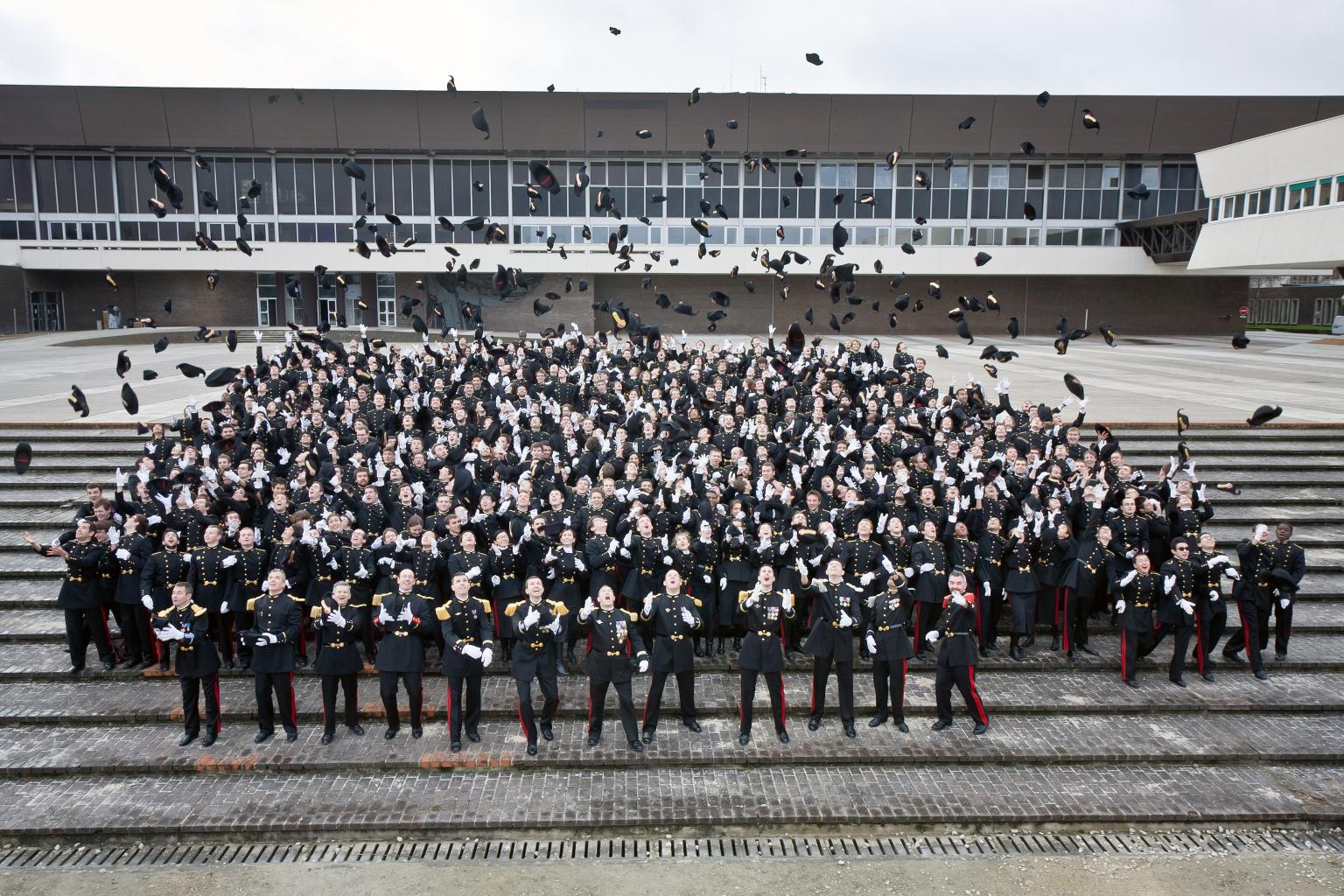 Campus de l'École polytechnique, Cour d'honneur ou Cour Vaneau. Promotion X 2010.